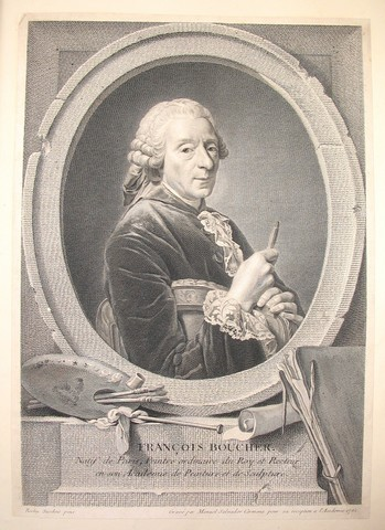 Portrait of François Boucher (1703-1770), French painter